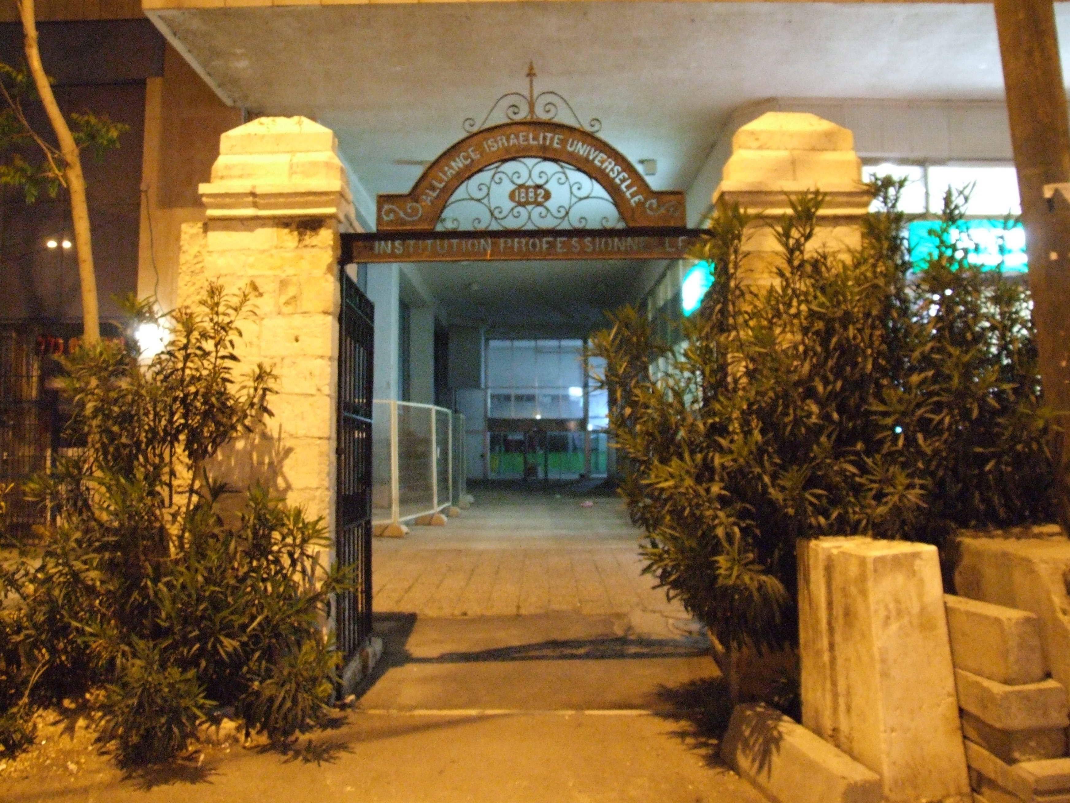 klal aite jerusalem israel